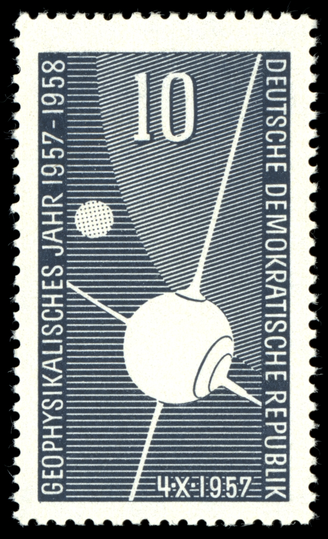 Information: Künstlicher Erdsatellit Sputnik 1, Teil der Erdkugel, Mond Ausgabepreis: 10 Pf First Day of Issue / Erstausgabetag: 7.11.1957 Auflage: 8.000.000 Entwurf: Vogenauer Druckverfahren: Offsetdruck Michel-Katalog-Nr: Ländercode-MiNr: 603